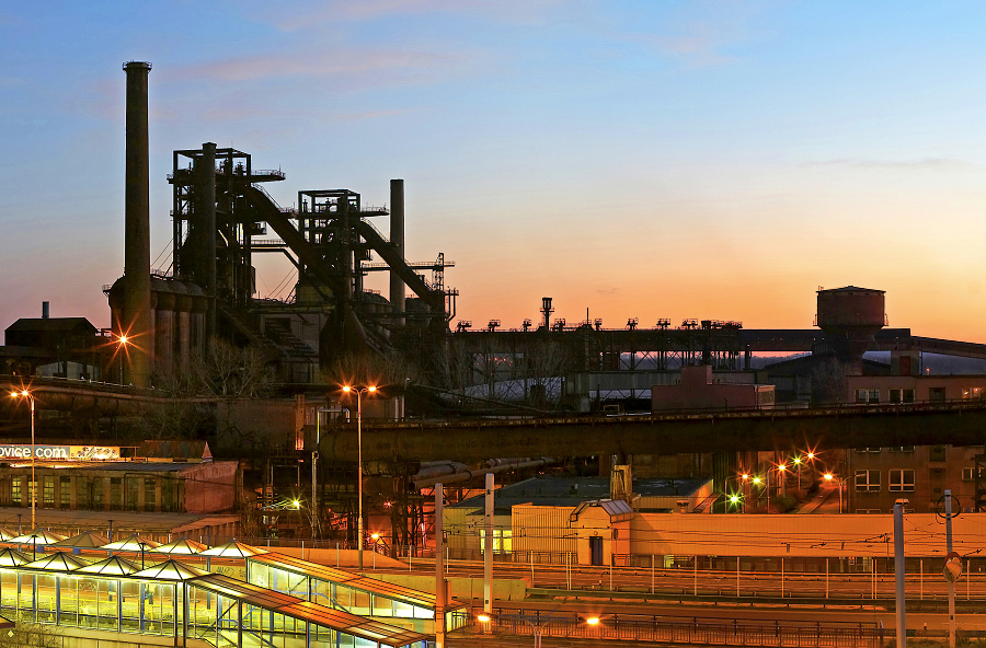 Dolní oblast Vítkovic - svítání